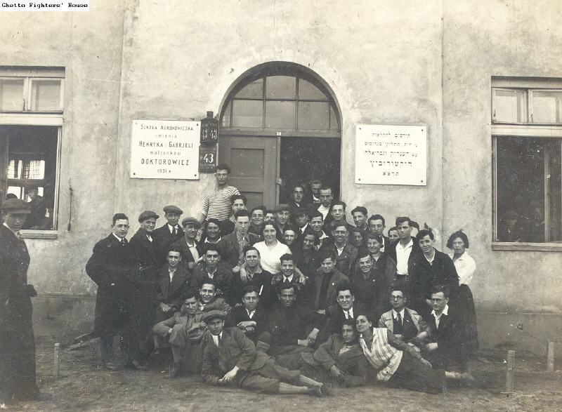 קבוצת אנשי "החלוץ" בחזית הבניין הראשי של קיבוץ גרוכוב